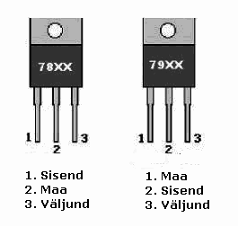 78xx ja 79xx väljaviigud